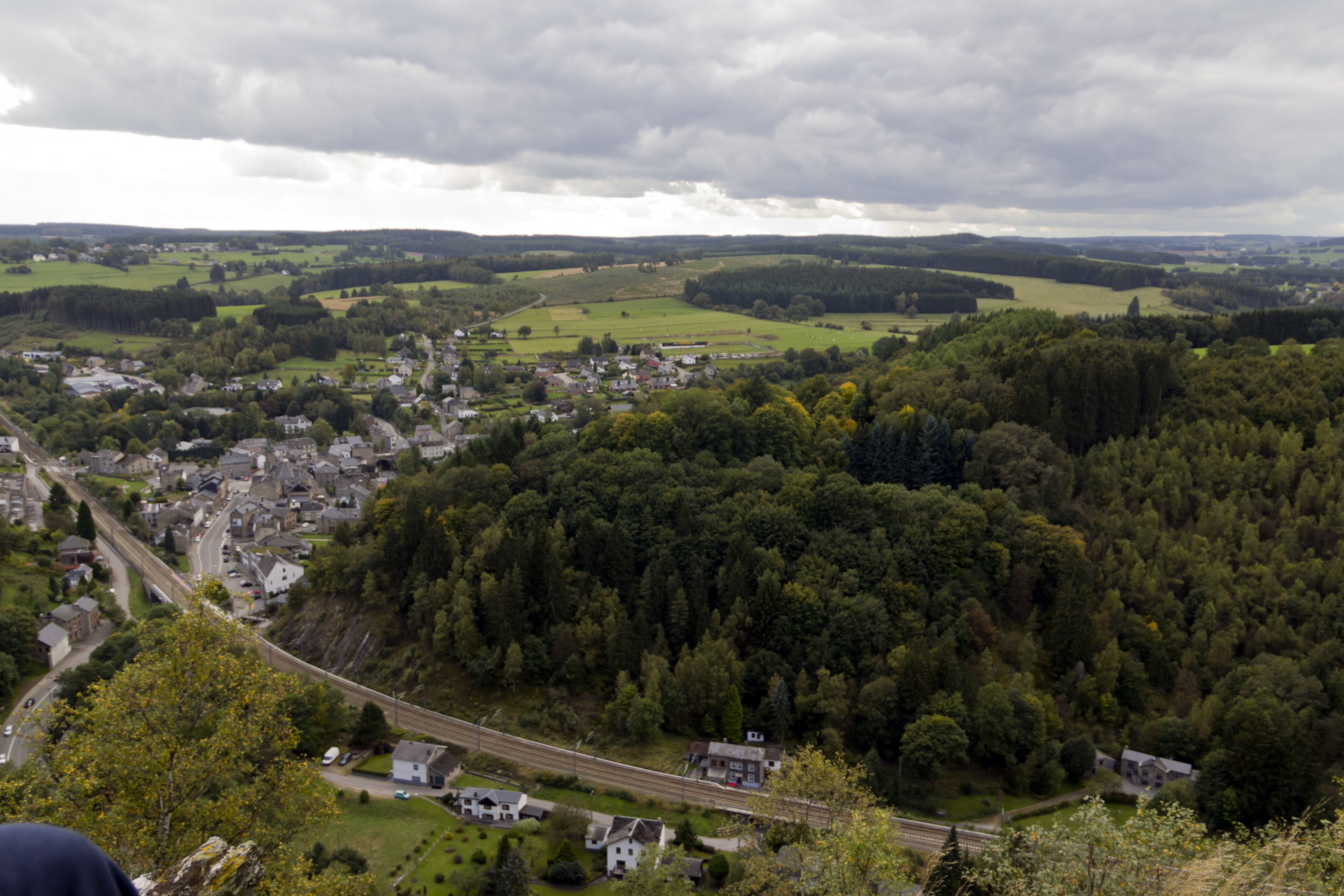 Partie orientale de la vallée du Glain entre Vielsalm et Salmchâteau, dite la Fosse roulette. Vue sur Salmchâteau depuis le Bec du Corbeau.